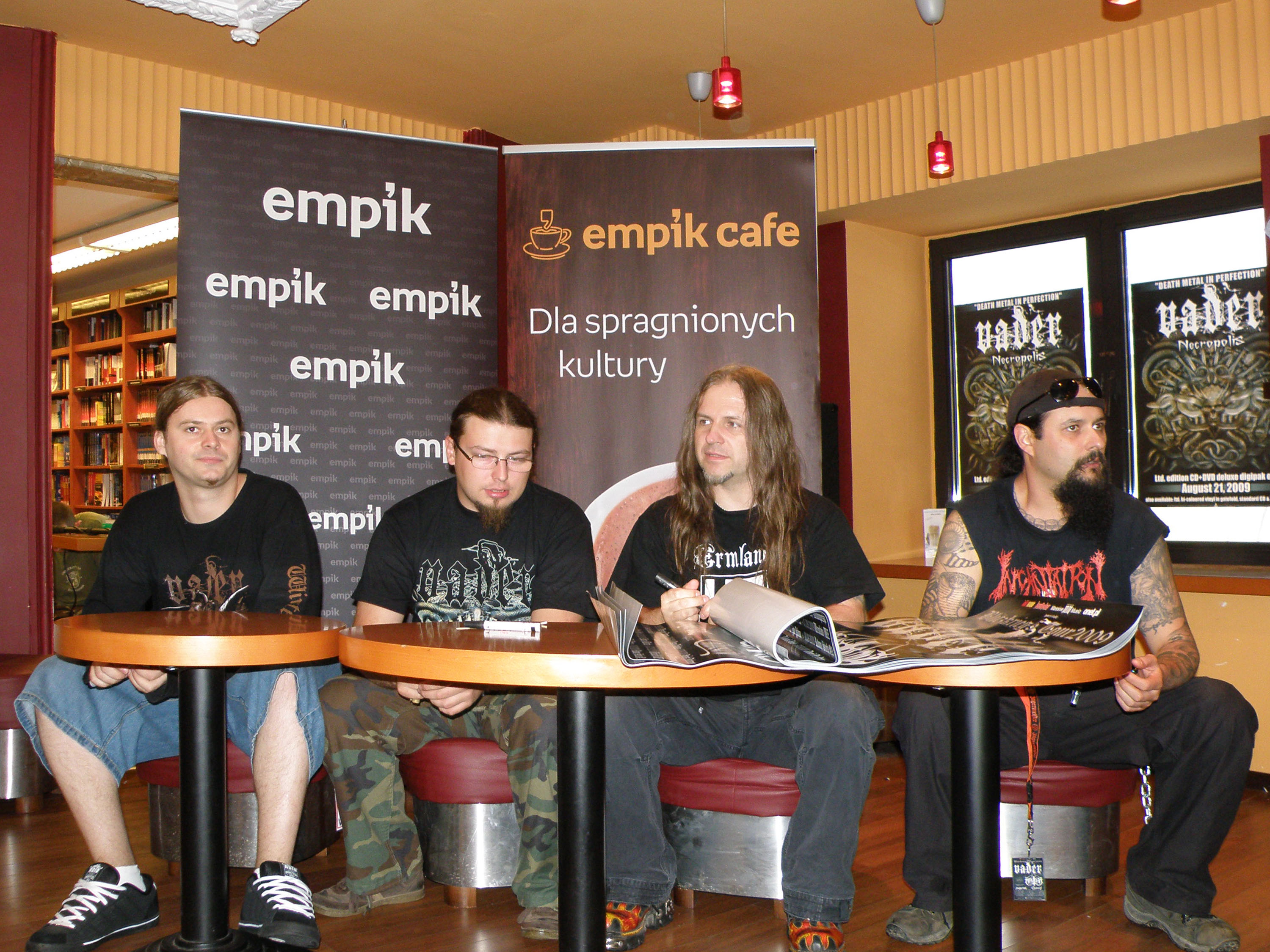 Vader, Warszawa, EMPiK Megastore Nowy Świat, ul. Nowy Świat 15/17 (29 sierpnia 2009)